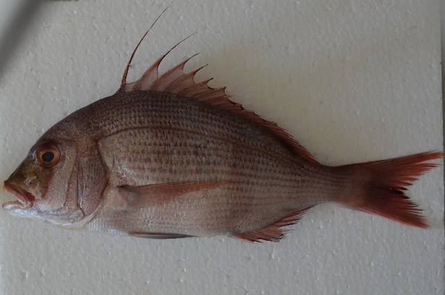 Cheimerius nufar